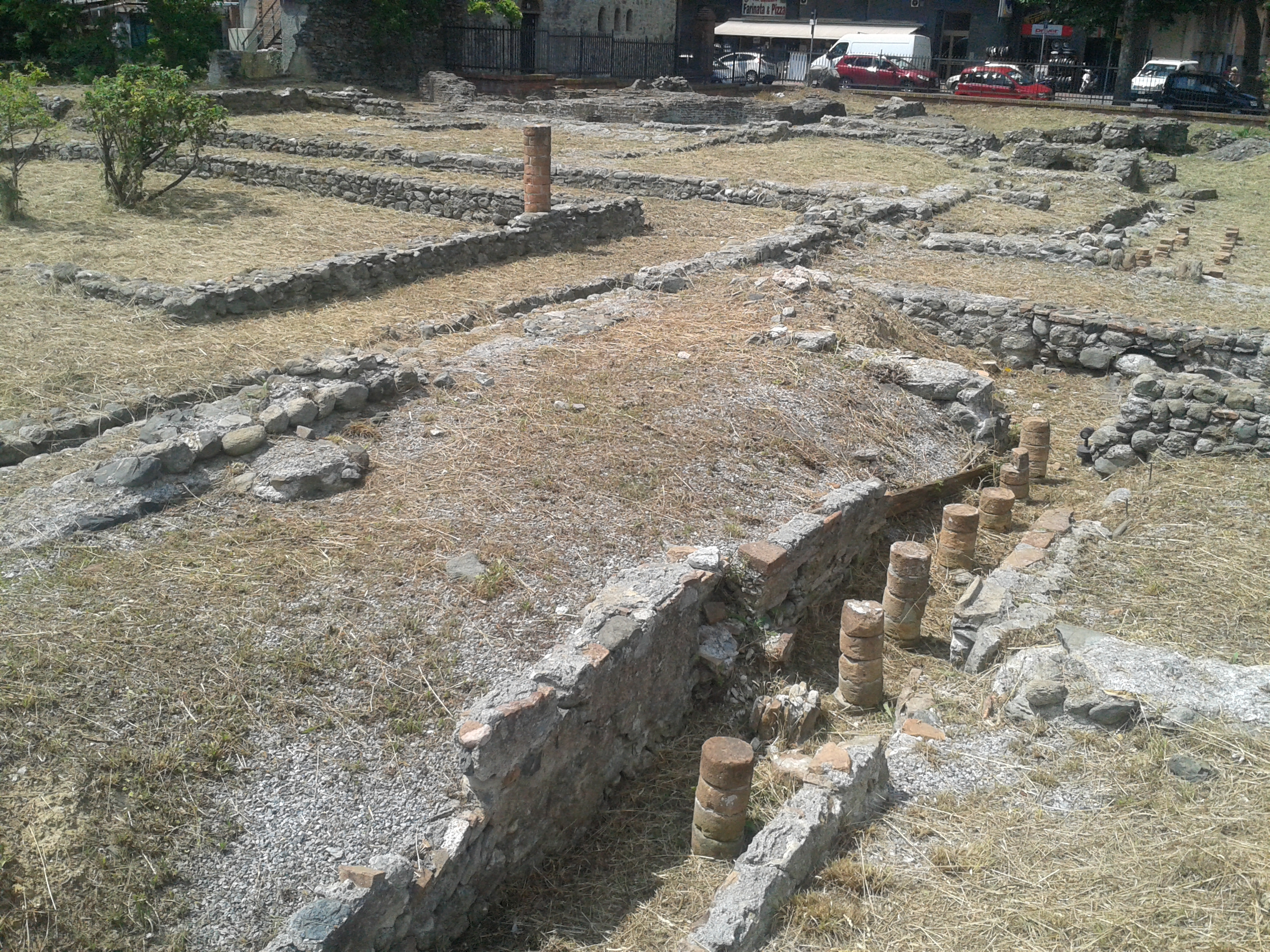 Villa romana di Alba Docilia - MIBAC This is a photo of a monument which is part of cultural heritage of Italy.